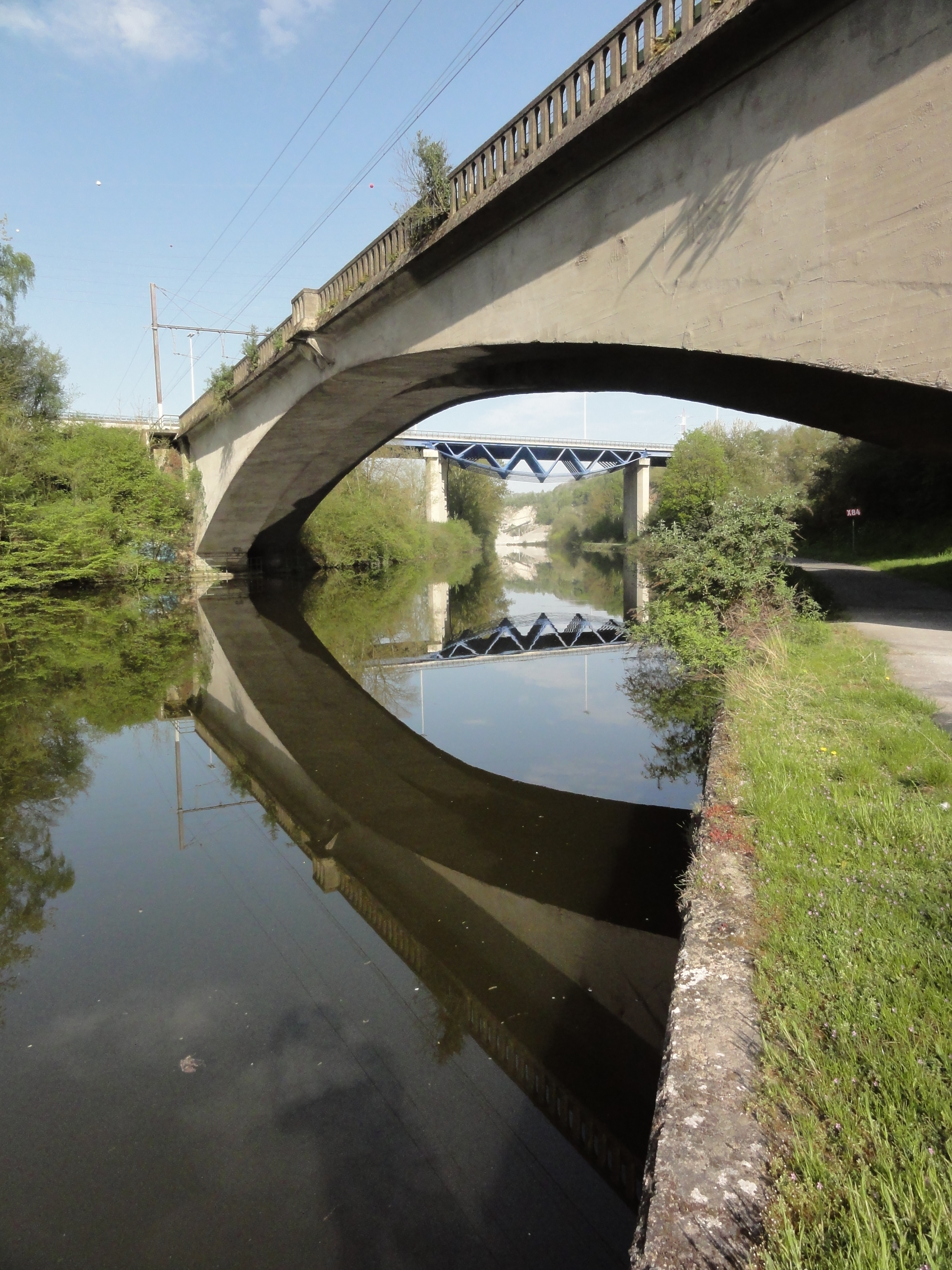 Montigny-le-Tilleul, pont de la R3 et pont du Chemin de fer sur la Sambre